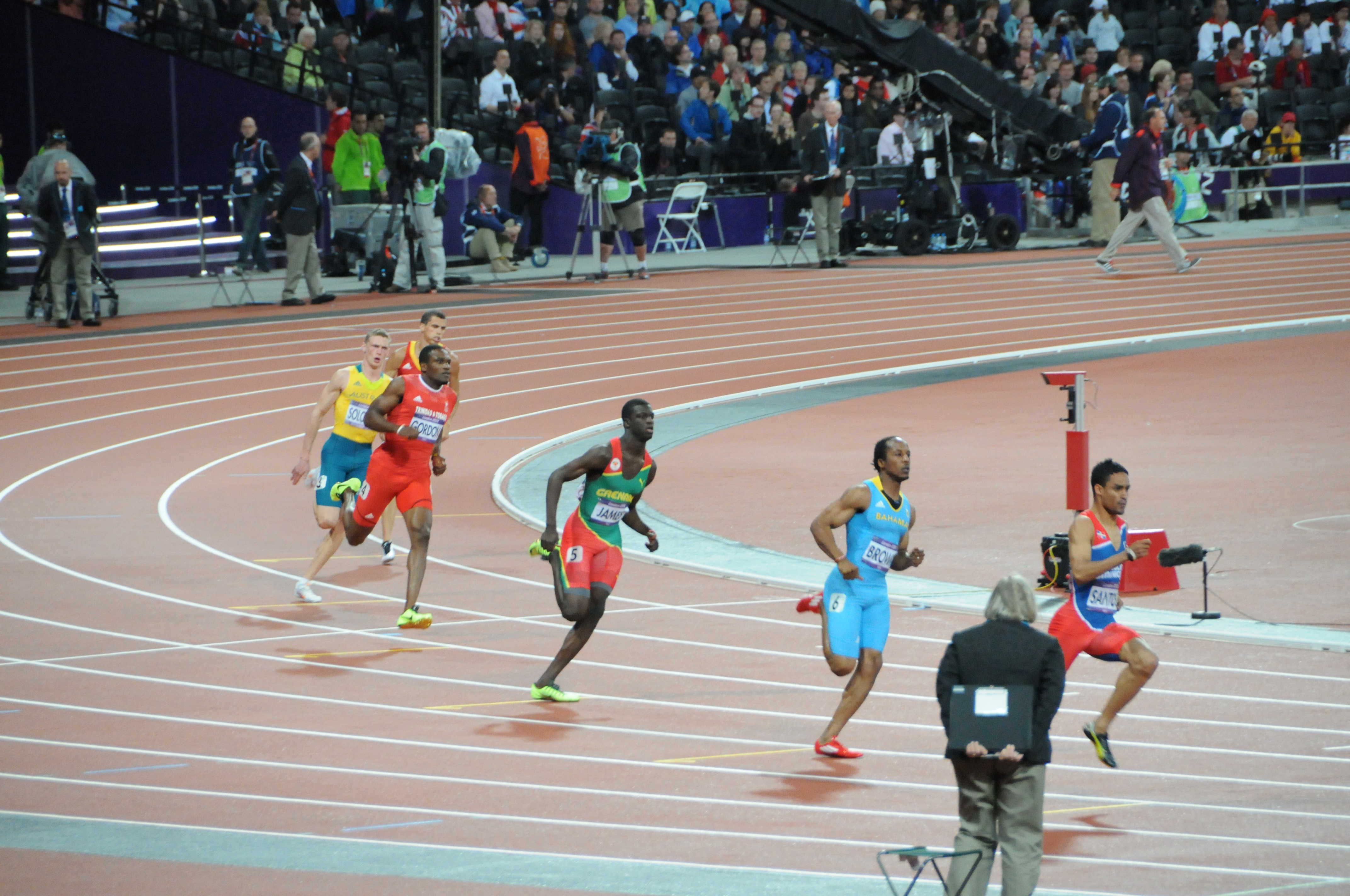 Finale du 400m hommes des jeux olympiques de Londres, 2012